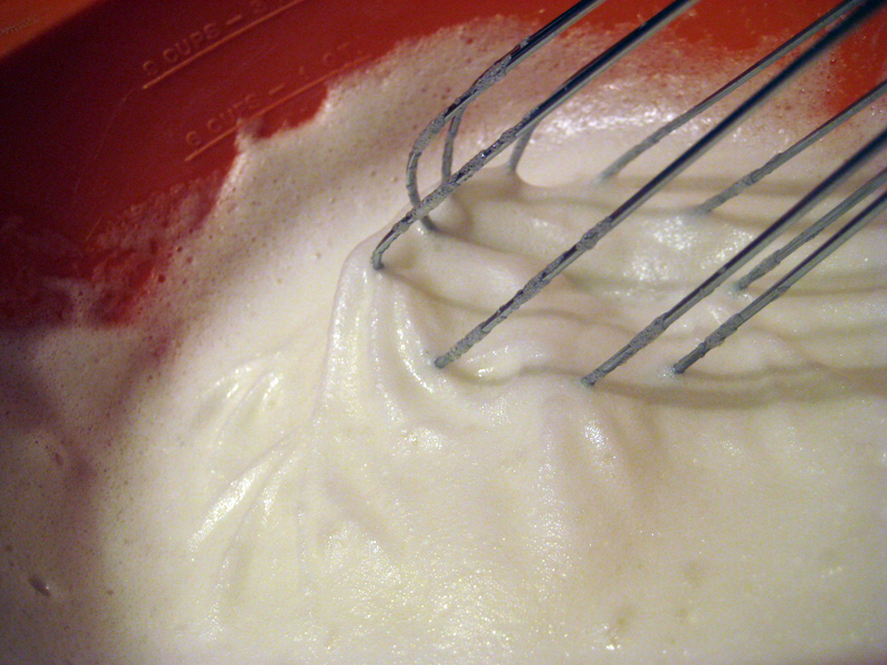 Making meringue - whisking.